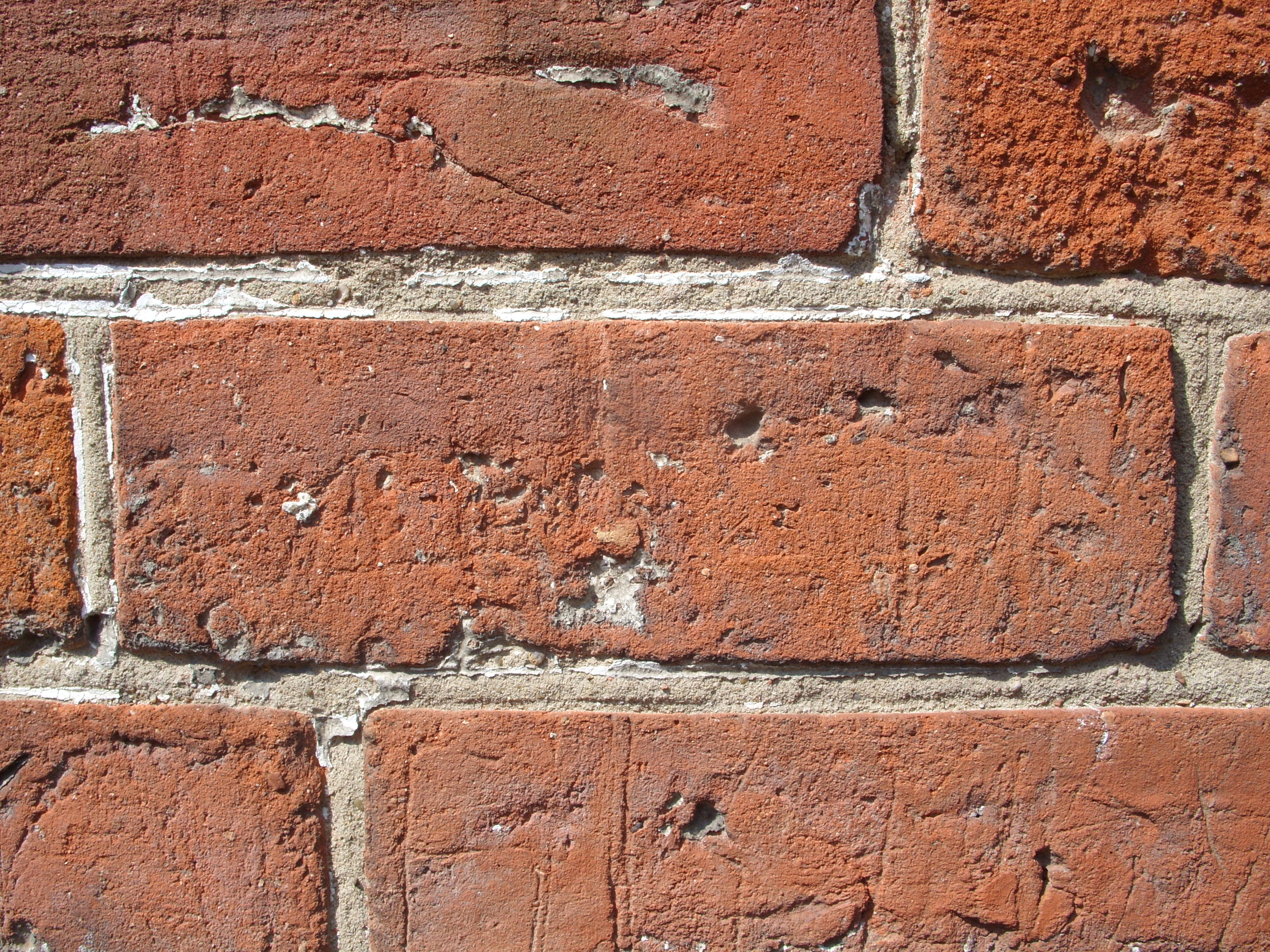 Лажок